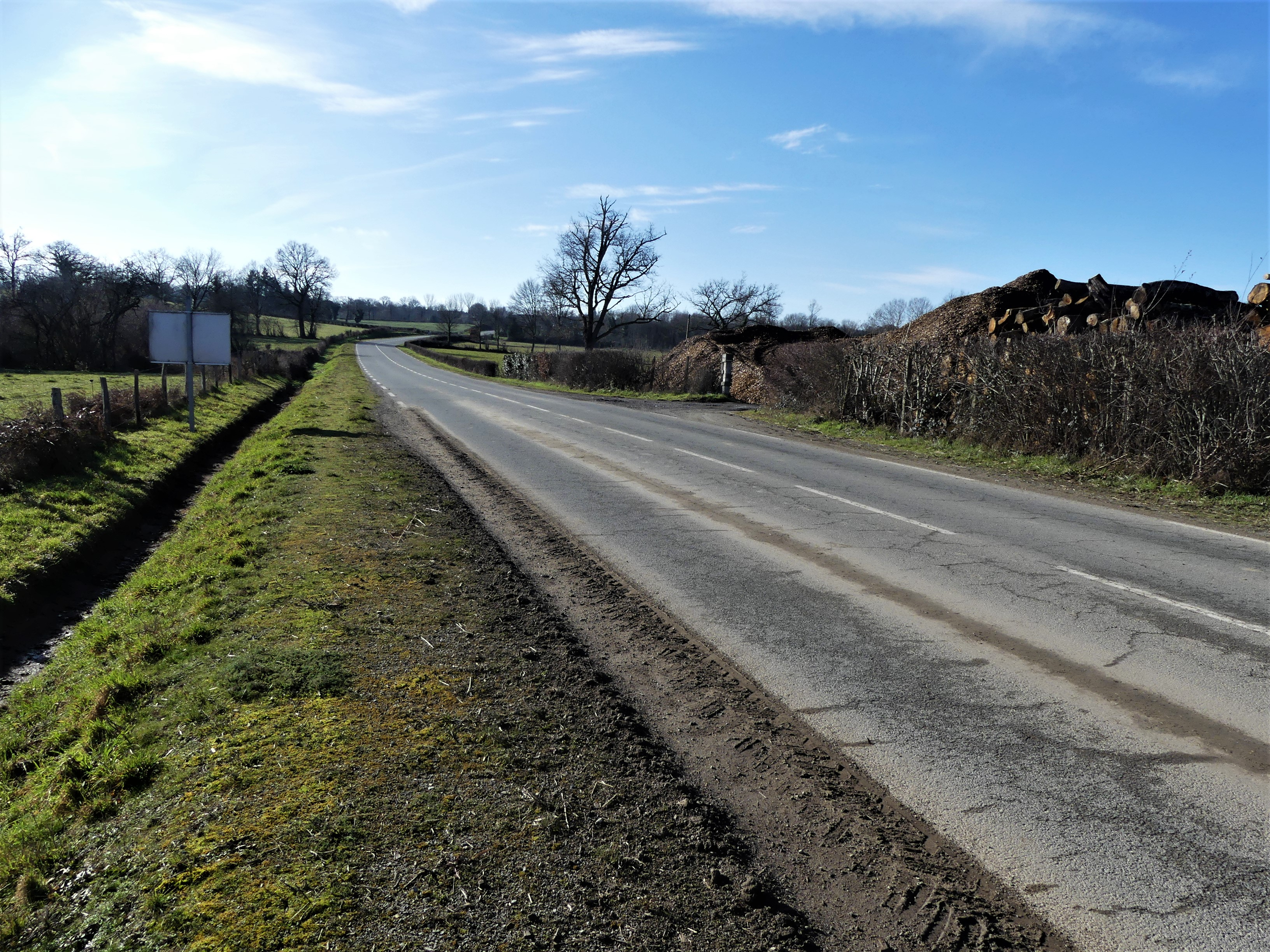 La route départementale 997 au lieu-dit Haut du Bois, commune de Saint-Chabrais, Creuse, France.